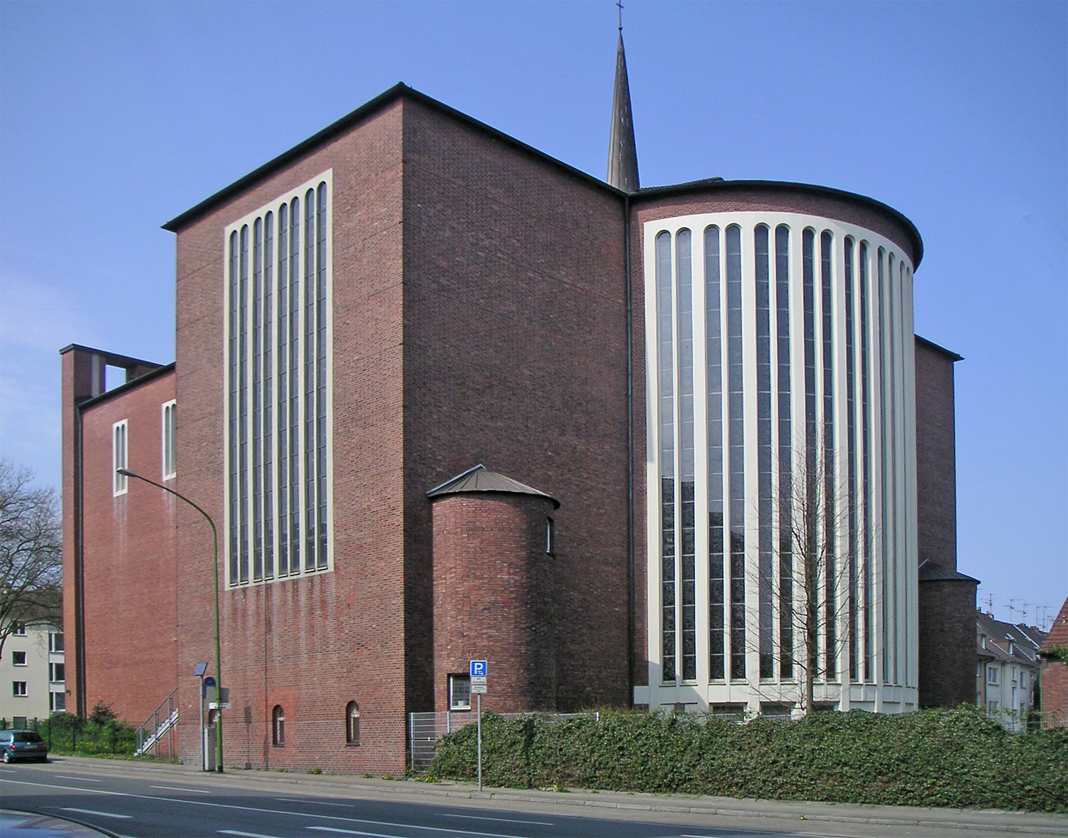 St. Engelbert, Essen-Südviertel. Architekt: Dominikus Böhm, Wiederaufbau durch Gottfried Böhm